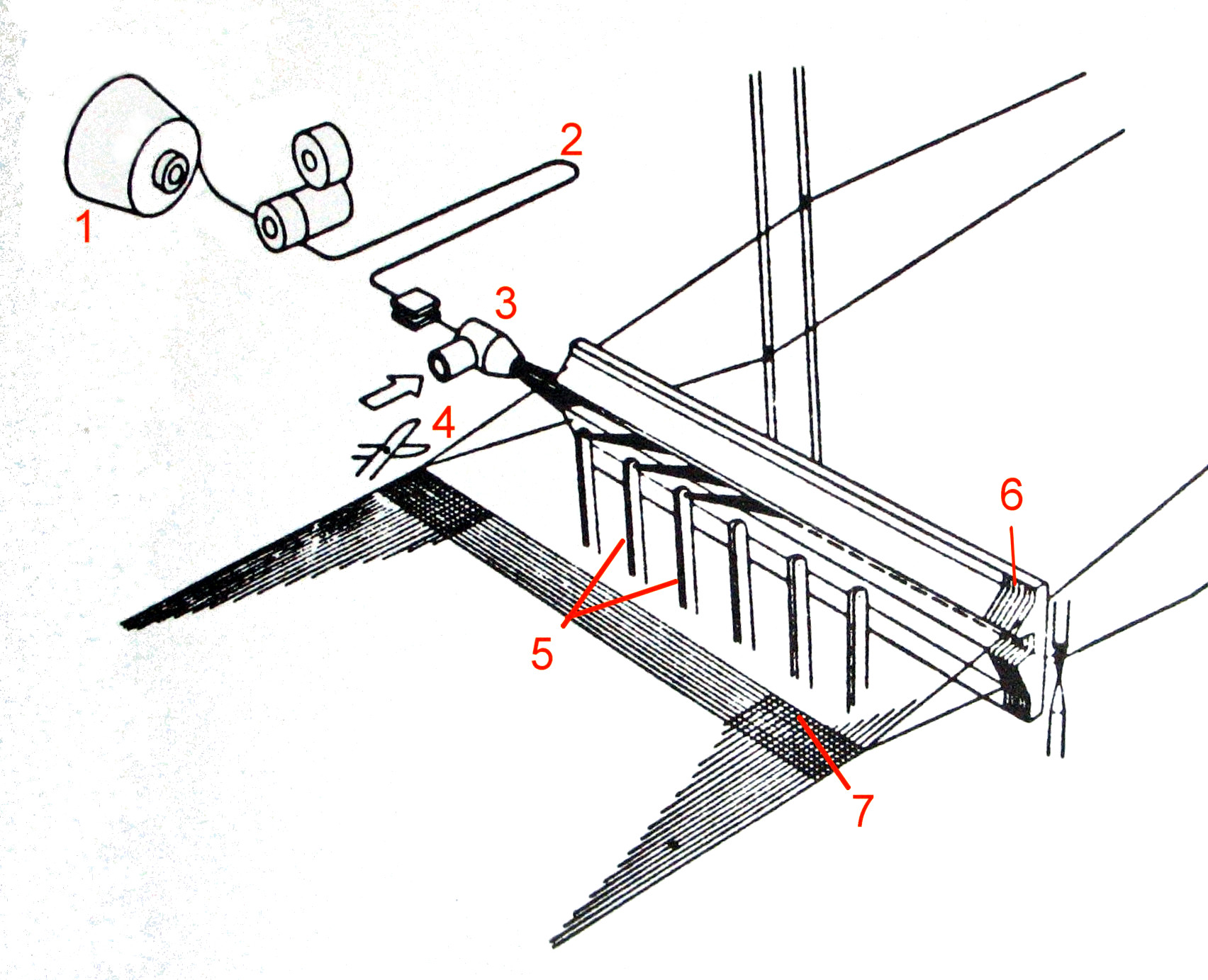 Schema: Schußeintrag an der Luftdüsen-Webmaschine